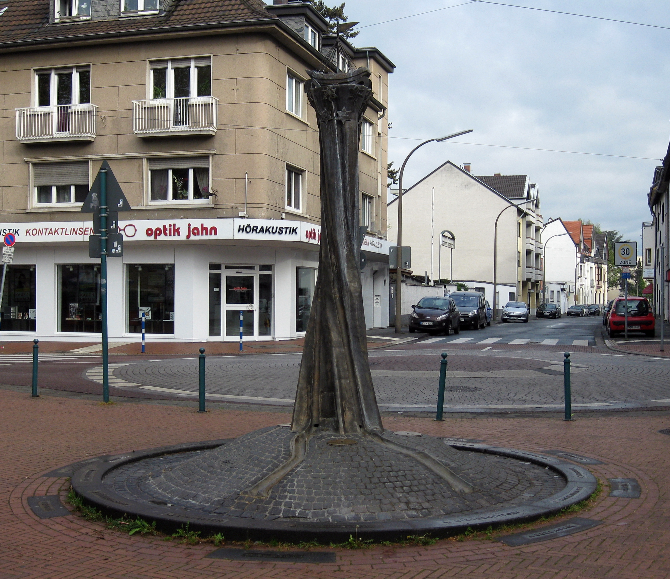 Deutschland, Bonn, Beuel-Mitte, Dr.-Weis-Platz: Stadtbrunnen. Gewidmet vom Heimat- und Geschichtsverein Beuel, gefördert von der Sparkasse Bonn. Zur Erinnerung an die Stadtwerdung Beuels. Künstlerin: Sigrid Wenzel; errichtet im September 1993.